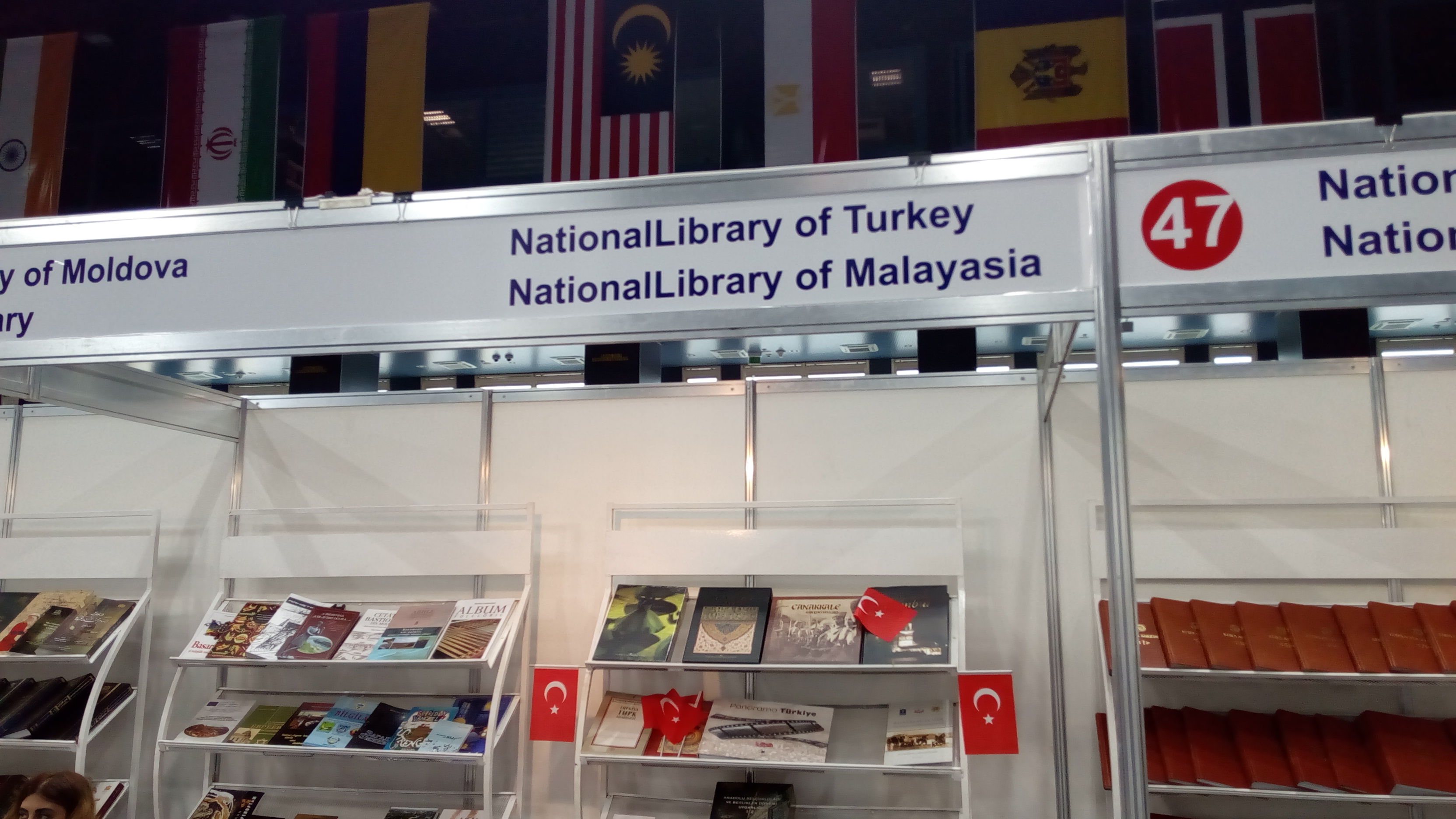 V Bakı Beynəlxalq Kitab Sərgi-Yarmarkası